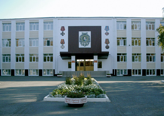 Тюменское высшее военно-инженерное командное училище